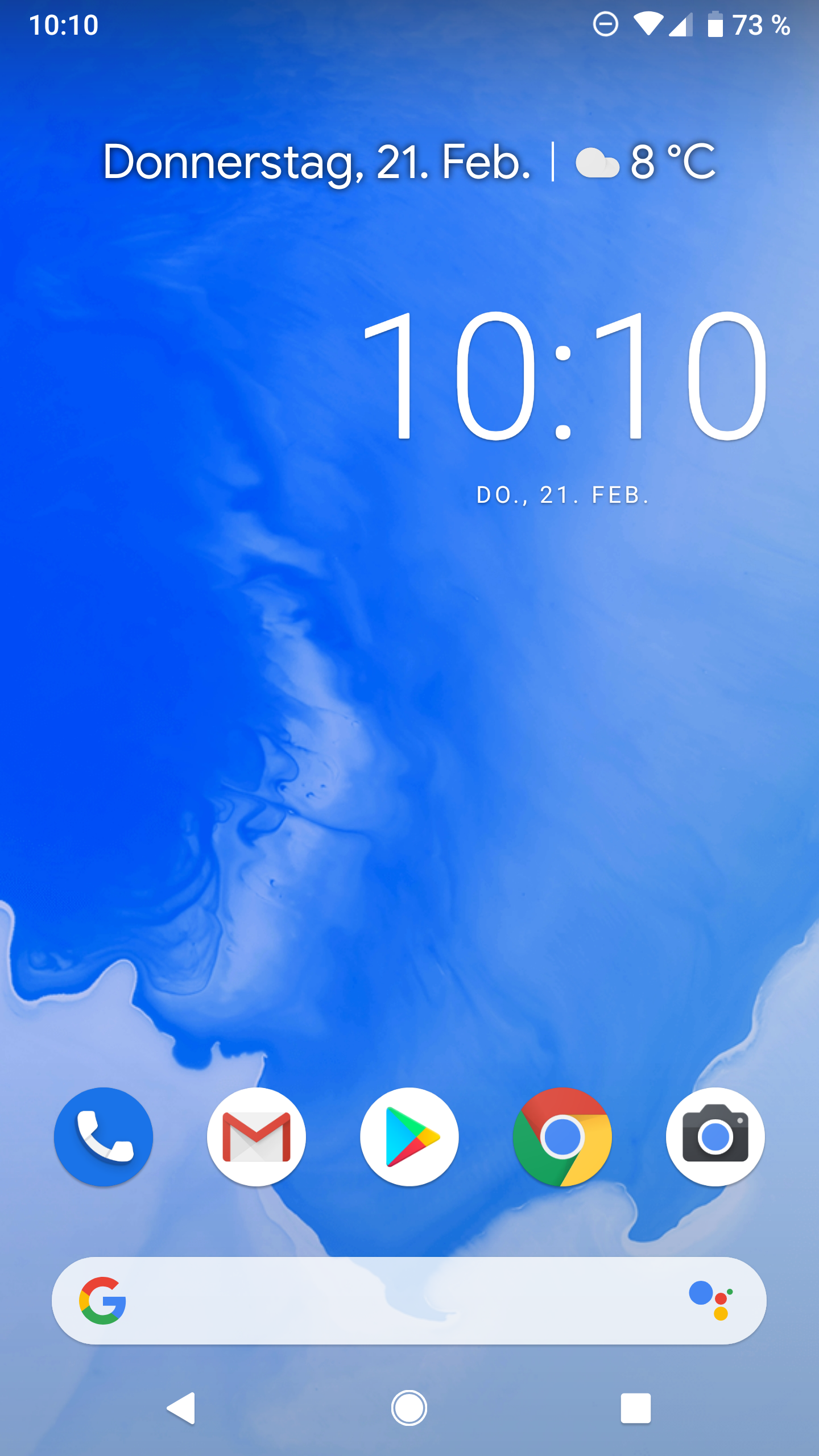 Android Pie 9.0 Startbildschirm